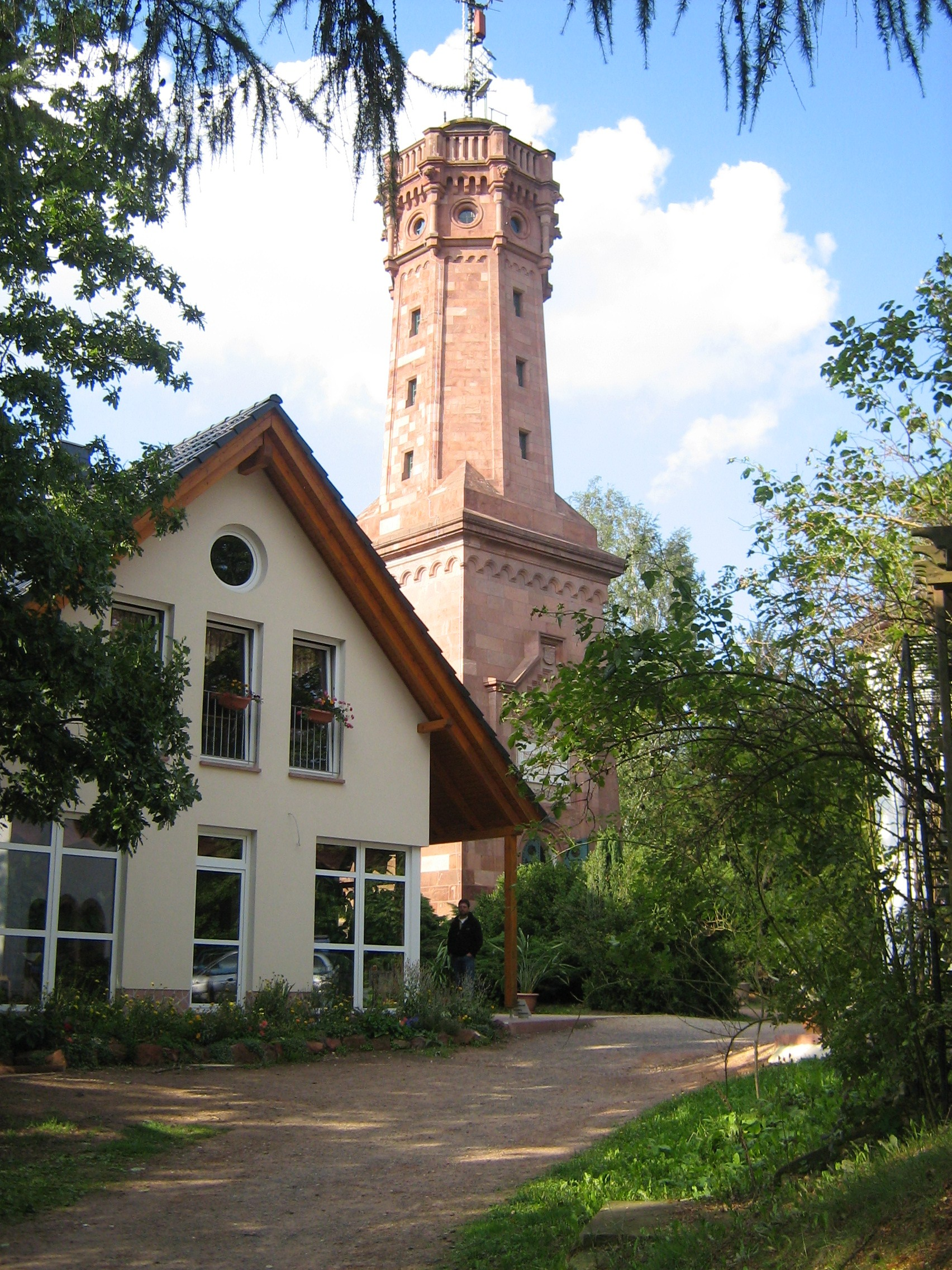 The Tower Friedrich August Turm and the Restaurant Türmerhaus on mountain of Rochlitz, Der Friedrich-August-Turm und das Türmerhaus am Rochlitzer Berg